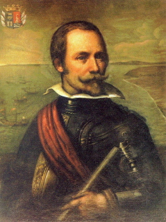 Retrato del almirante Antonio de Oquendo (1577-1640), conservado en el Museo Naval de Madrid, (España).